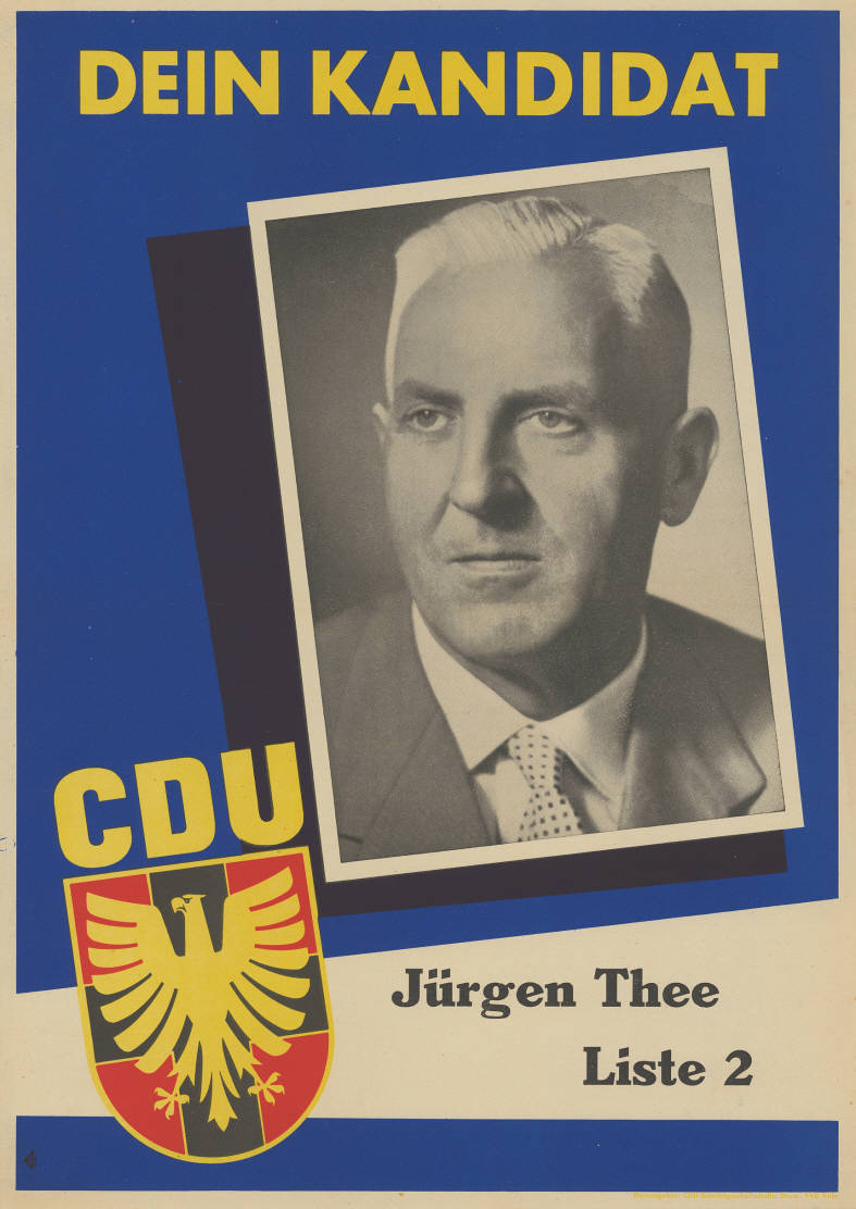 Dein Kandidat CDU Jürgen Thee Liste 2 Abbildung: Porträtfoto - CDU-Logo Plakatart: Kandidaten-/Personenplakat mit Porträt Auftraggeber: CDU-Bundesgeschäftsstelle Drucker_Druckart_Druckort: KVD, Köln Objekt-Signatur: 10-012 : 167 Bestand: Landtagswahlplakate Schleswig-Holstein (10-012) GliederungBestand10-18: Landtagswahlplakate Schleswig-Holstein (10-012) » CDU Lizenz: KAS/ACDP 10-012 : 167 CC-BY-SA 3.0 DE